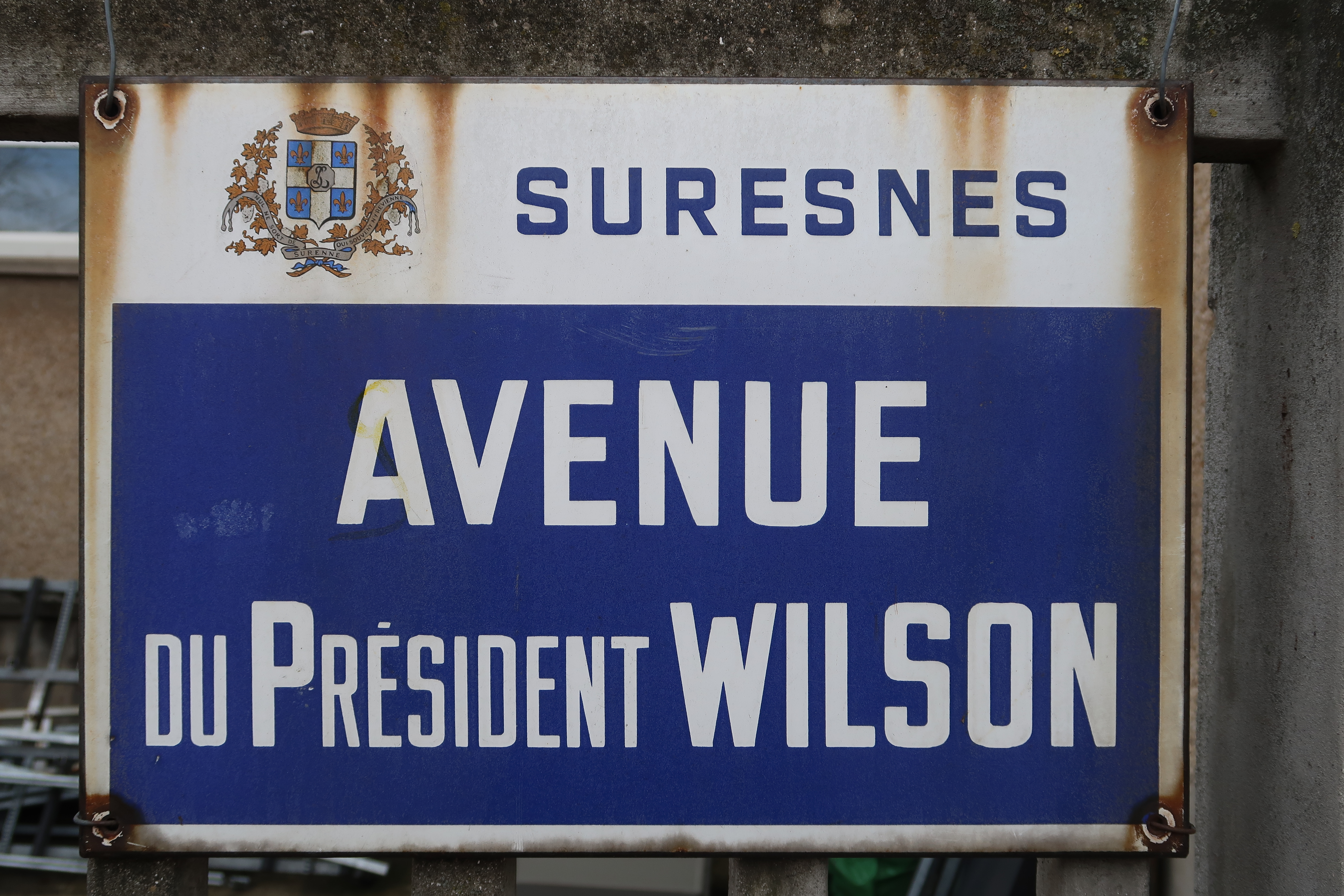 Plaque de l'avenue du Président-Wilson à Suresnes (Hauts-de-Seine).